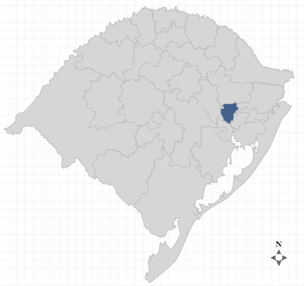 Localização Vale do Caí